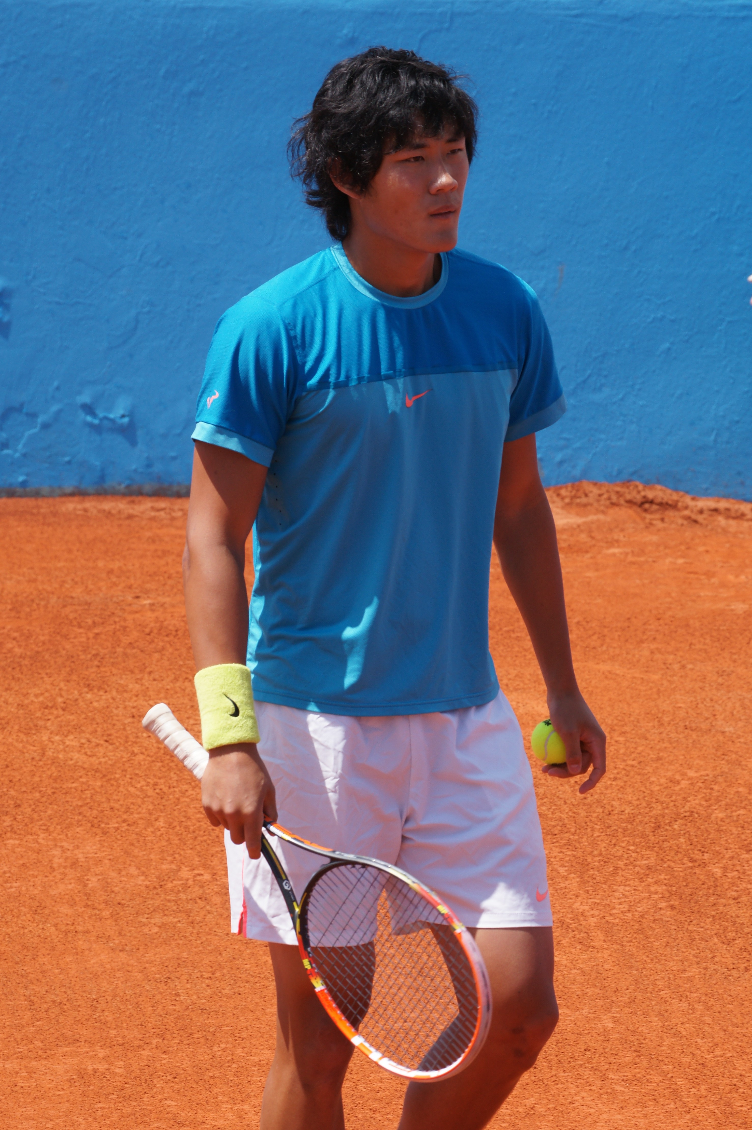 Zhizhen Zhang Nice ATP